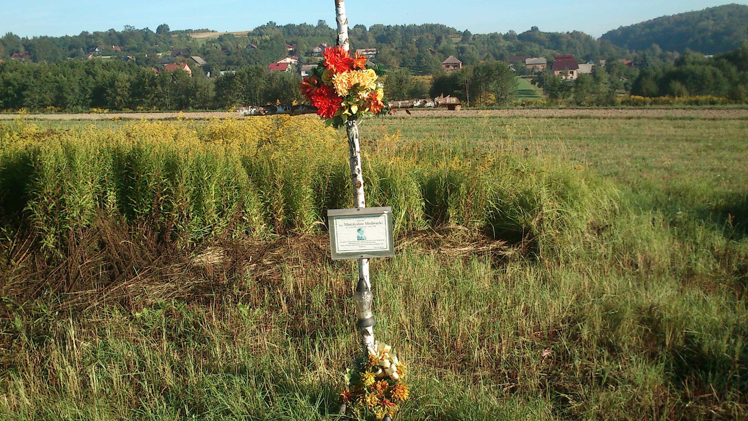 Brzozowy krzyż umieszczony w miejscu katastrofy samolotu kpt.pil. Mieczysława Medweckiego 1.09.1939 we wsi Chrosna k.Krakowa